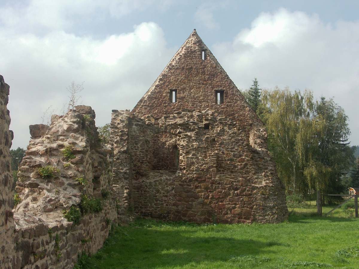 Kloster Buch: Ruine des ehemaligen Brauhauses im Laienbereich